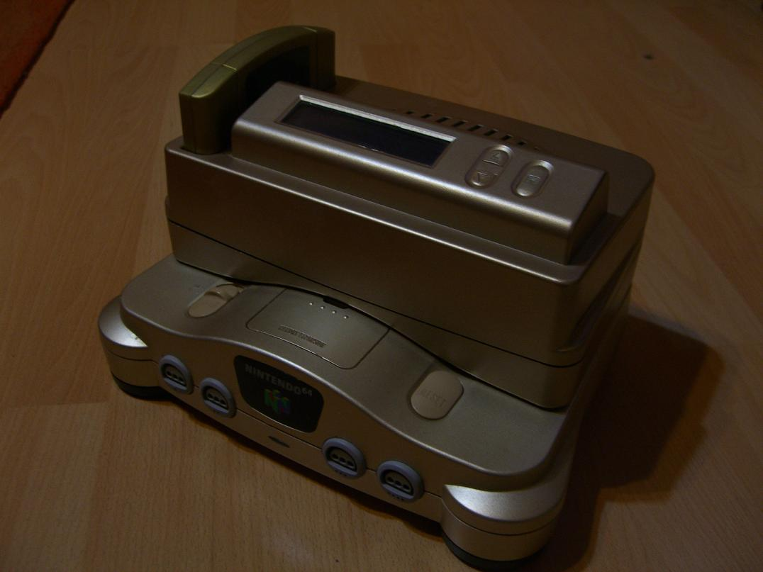 Goldenes N64 + Sicherheitskopie Gerät